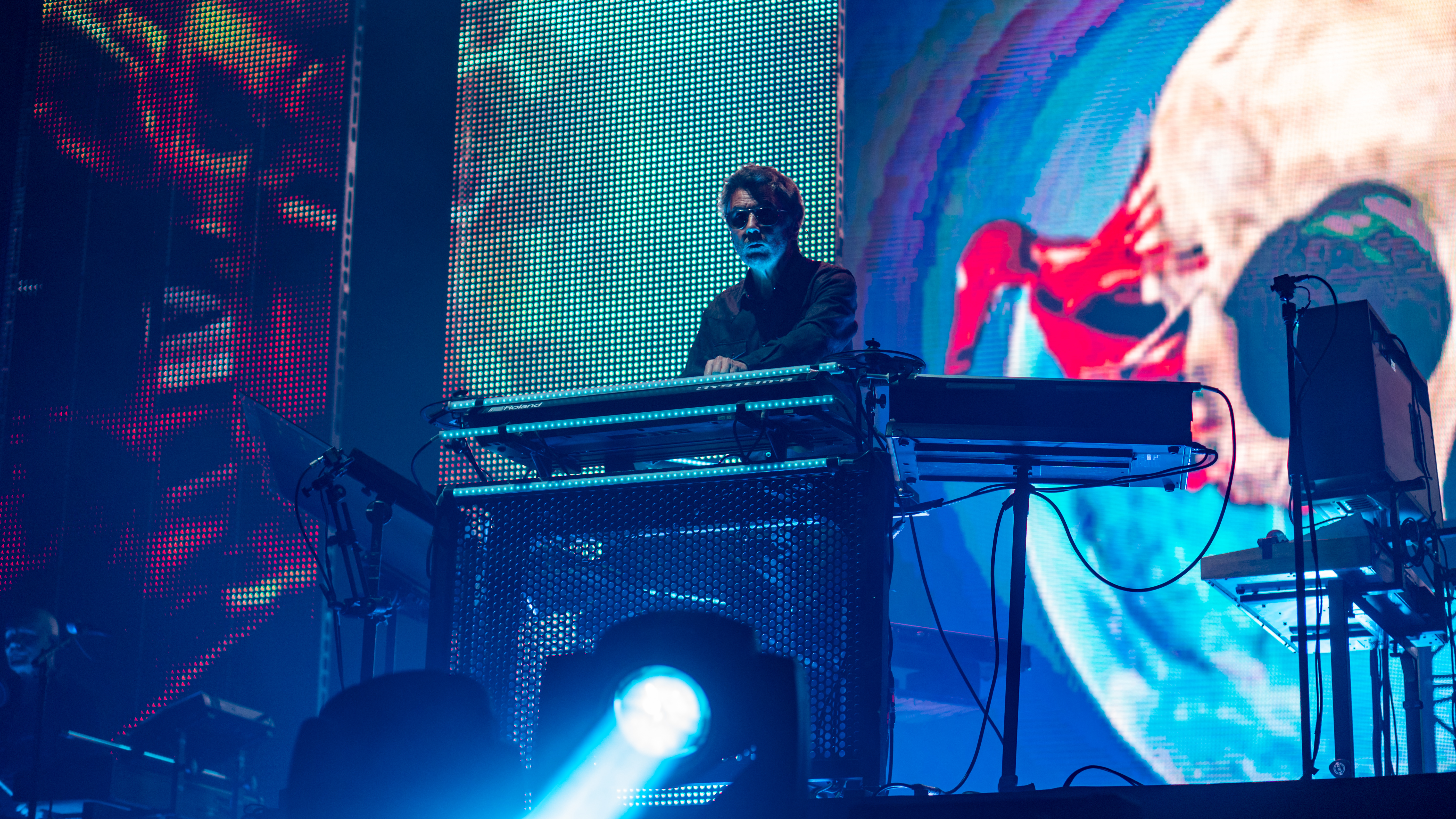 Coachella18W1-100